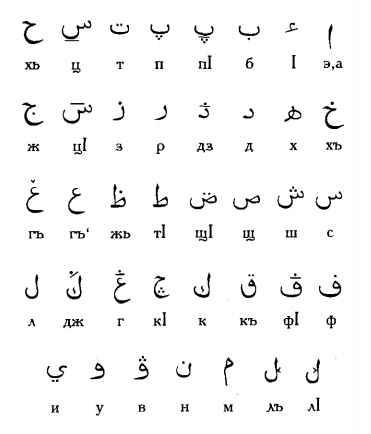 Алфавит Бекмурзы Пачева (1881)